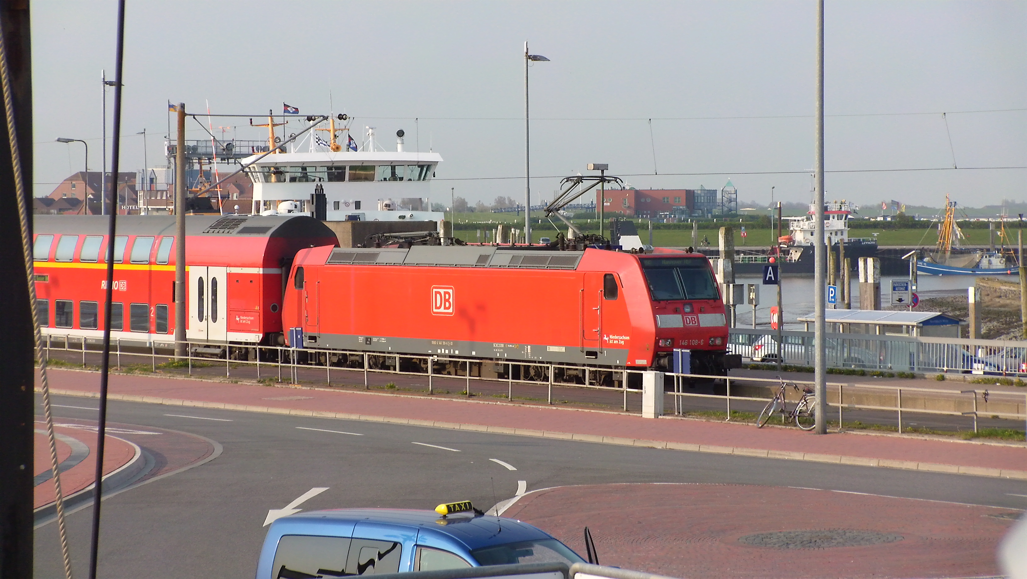 Die DB-Baureihe 146 im Bahnhof Norddeich Mole.